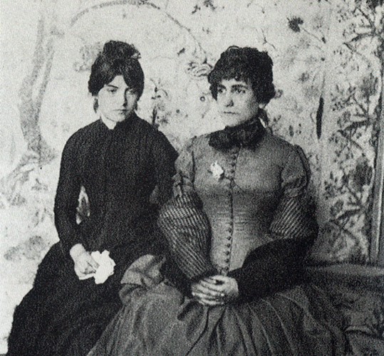 Suzanne Valadon et Jeanne Wenz (a) (c 1890) photo Francois Gauzi